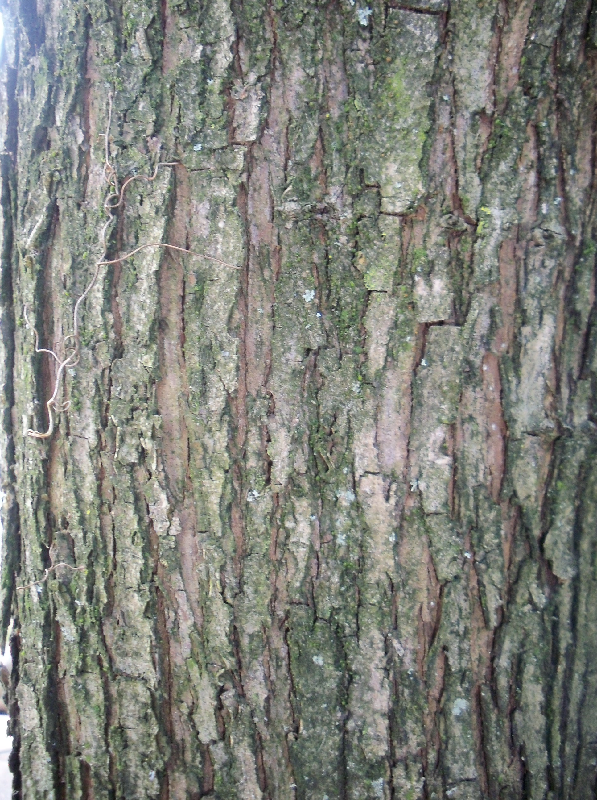 Corteccia di Crataegus monogyna